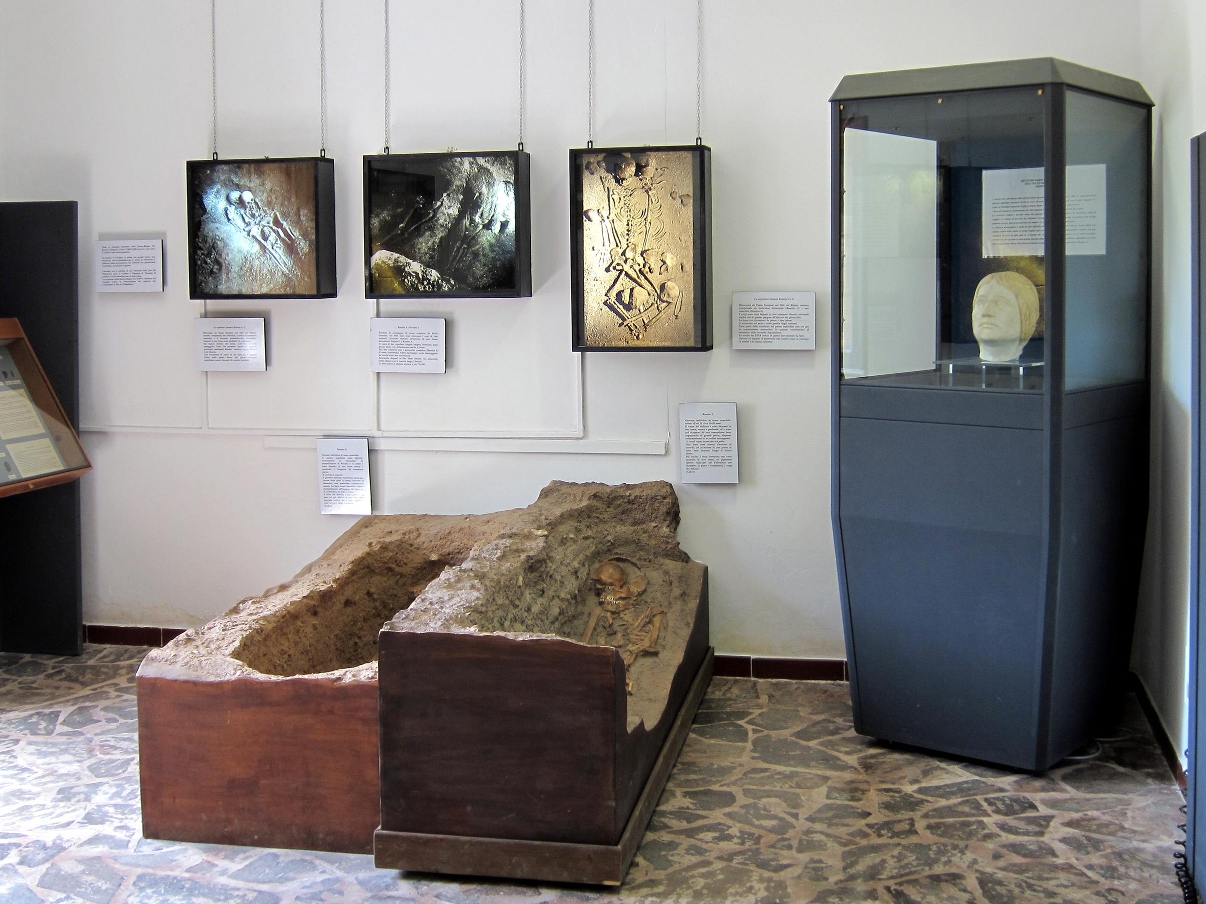 Espace muséal du site de la Grotta del Romito.